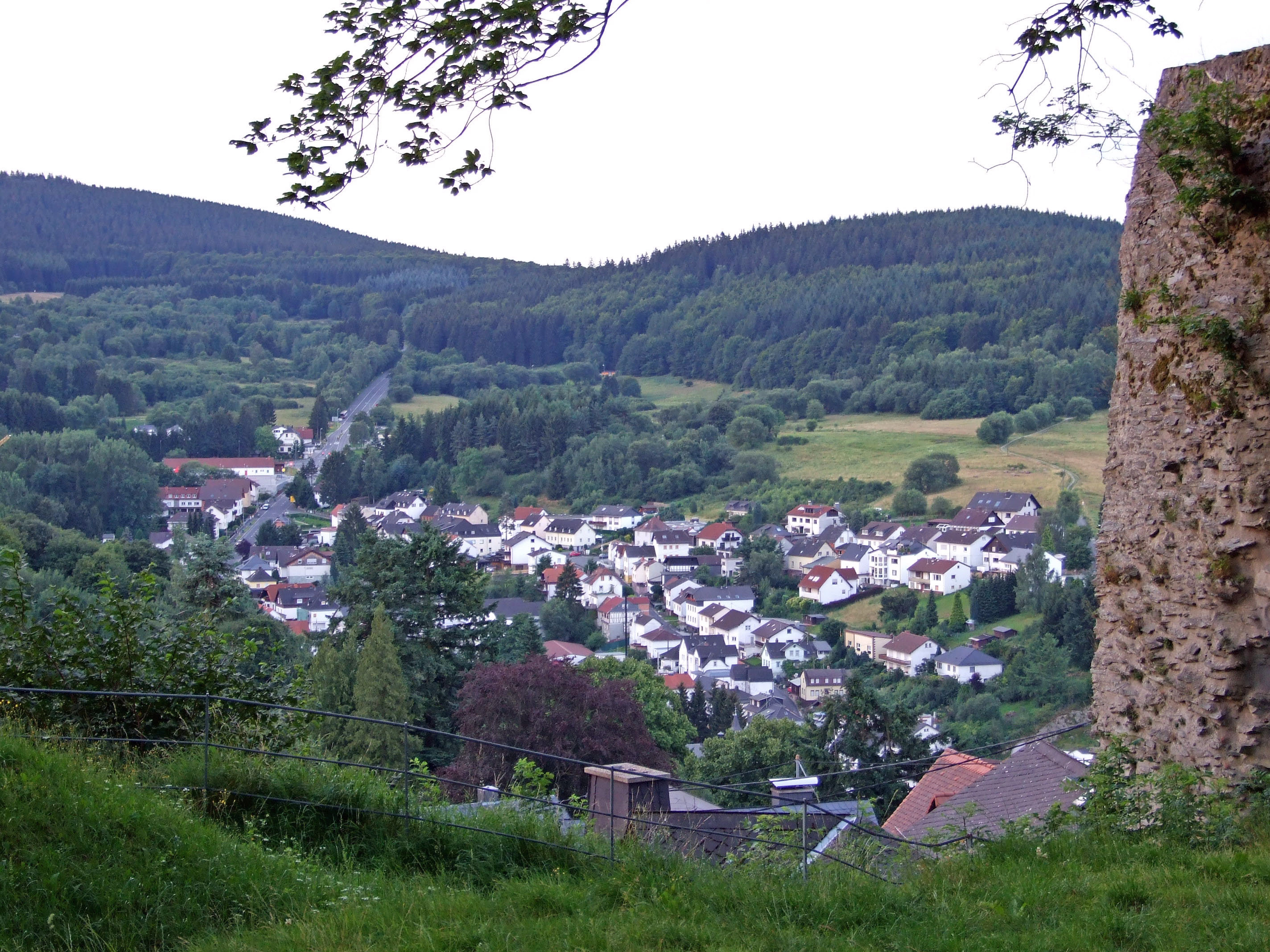 Niederreifenberg im Hintertaunus